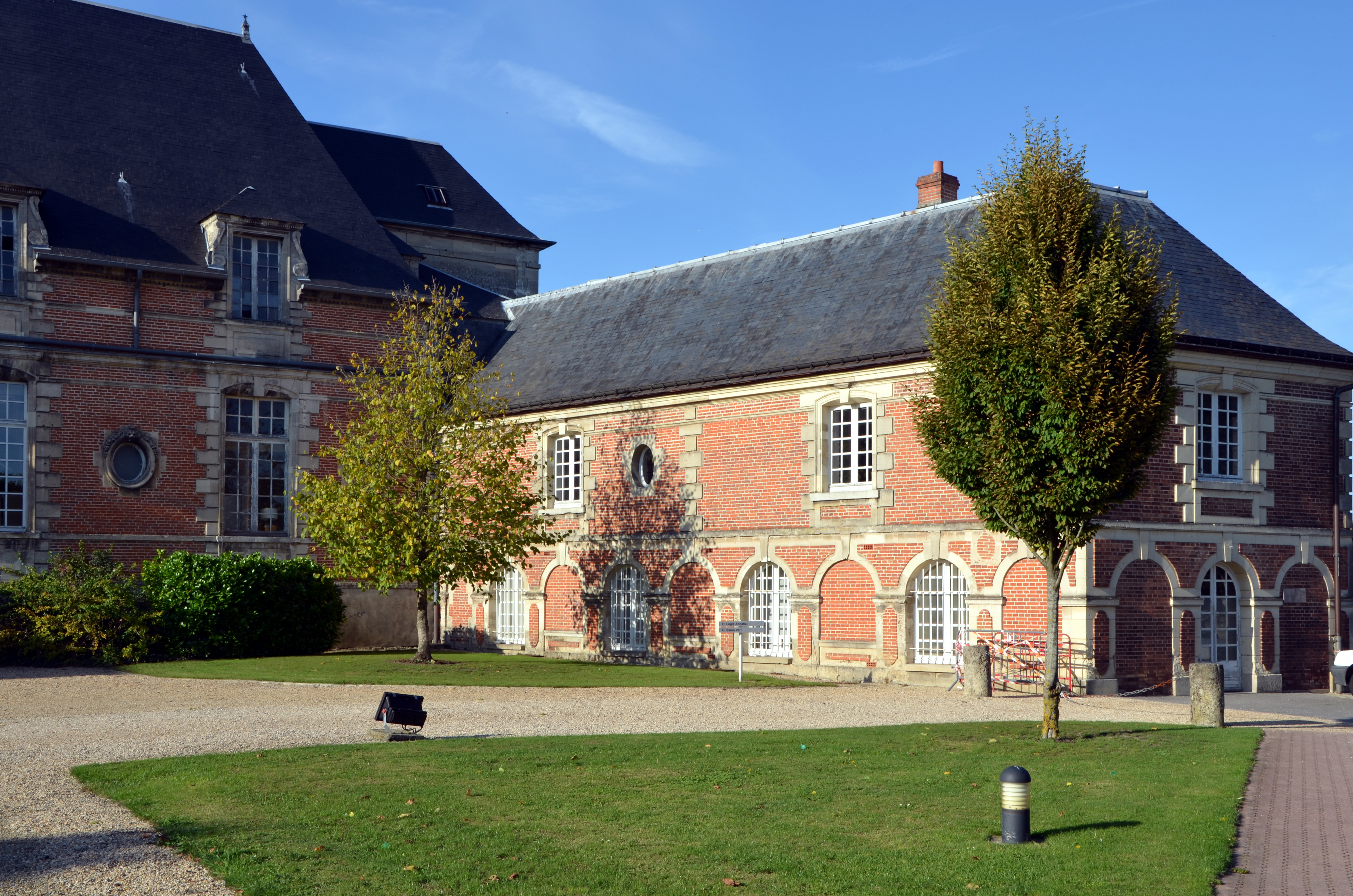 Ancien logis-abbatial de l'abbaye St Martin a Laon, Aisne, France .